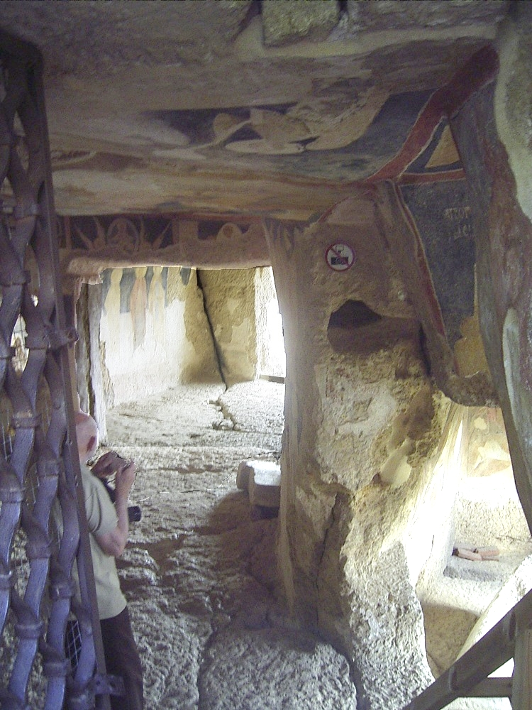 Felskirche Ivanovo Gesamtansicht von aussen, links Kirchenraum, rechts Kapelle